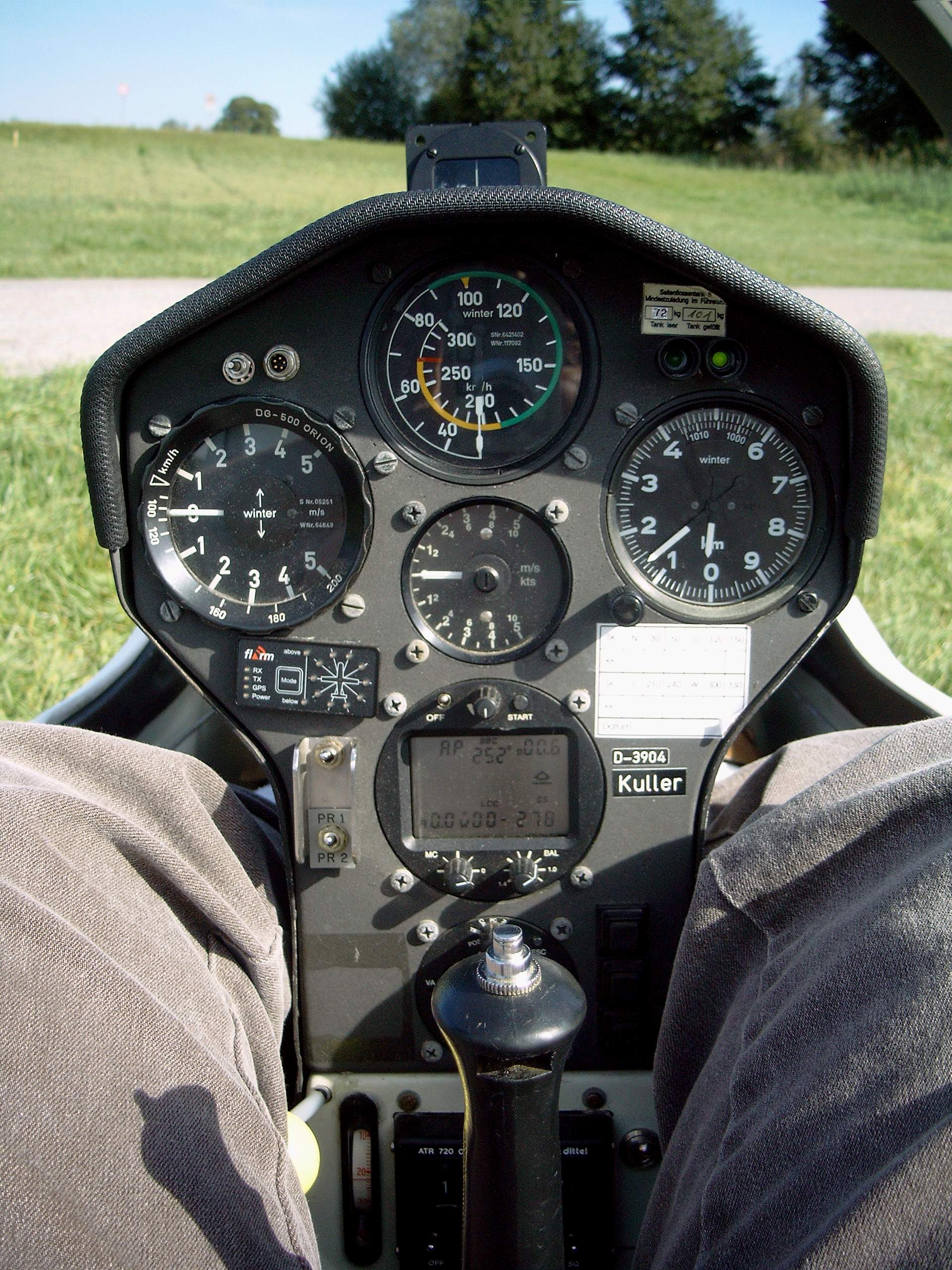 DG-505 Front panel